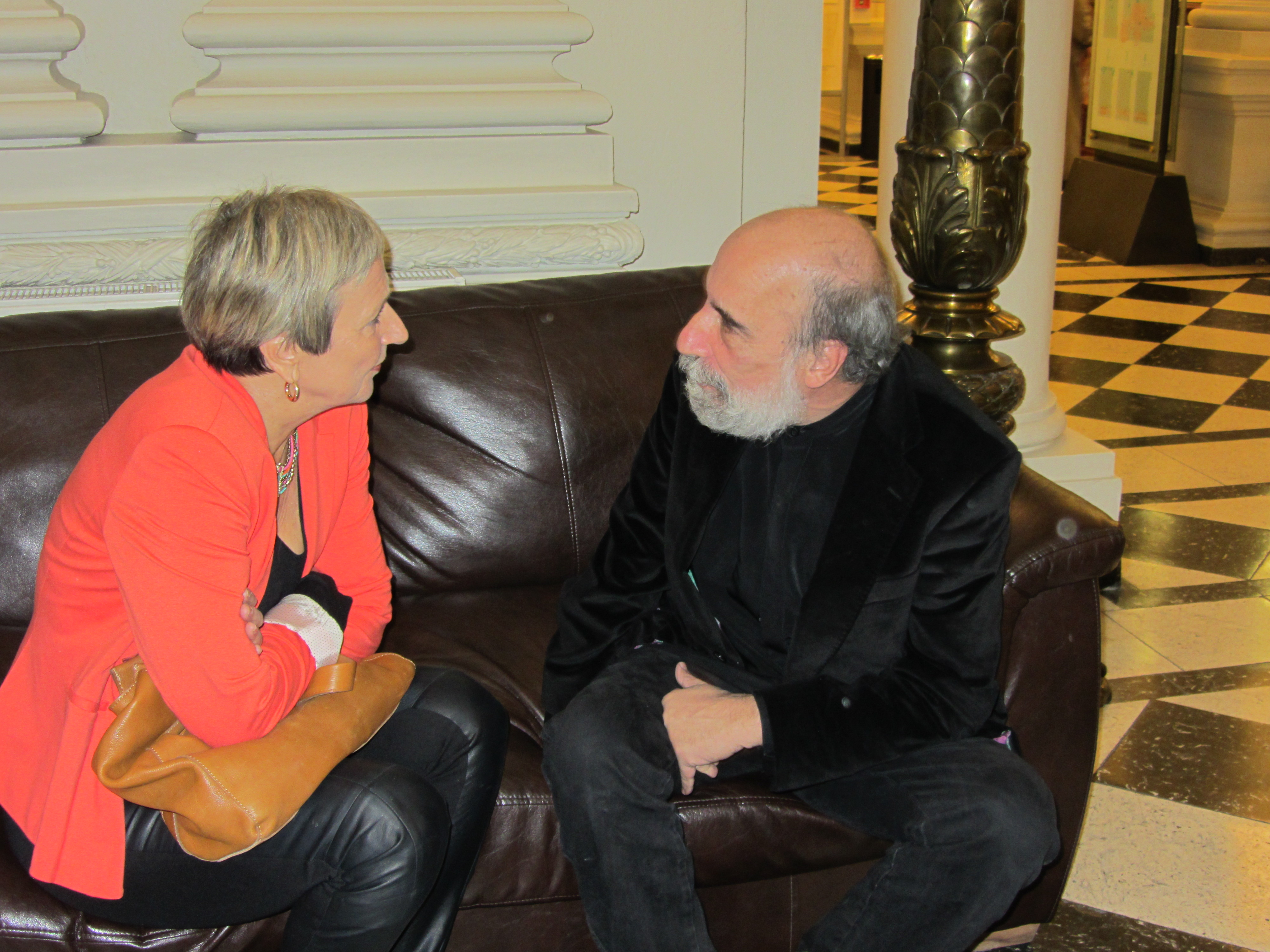 La escritora y traductora francesa radicada en México Fabienne Badru y el poeta chileno Raúl Zurita en la Biblioteca Nacional; presentación del libro Íntegra de Gonzalo Rojas, Santiago, 25 de abril de 2013